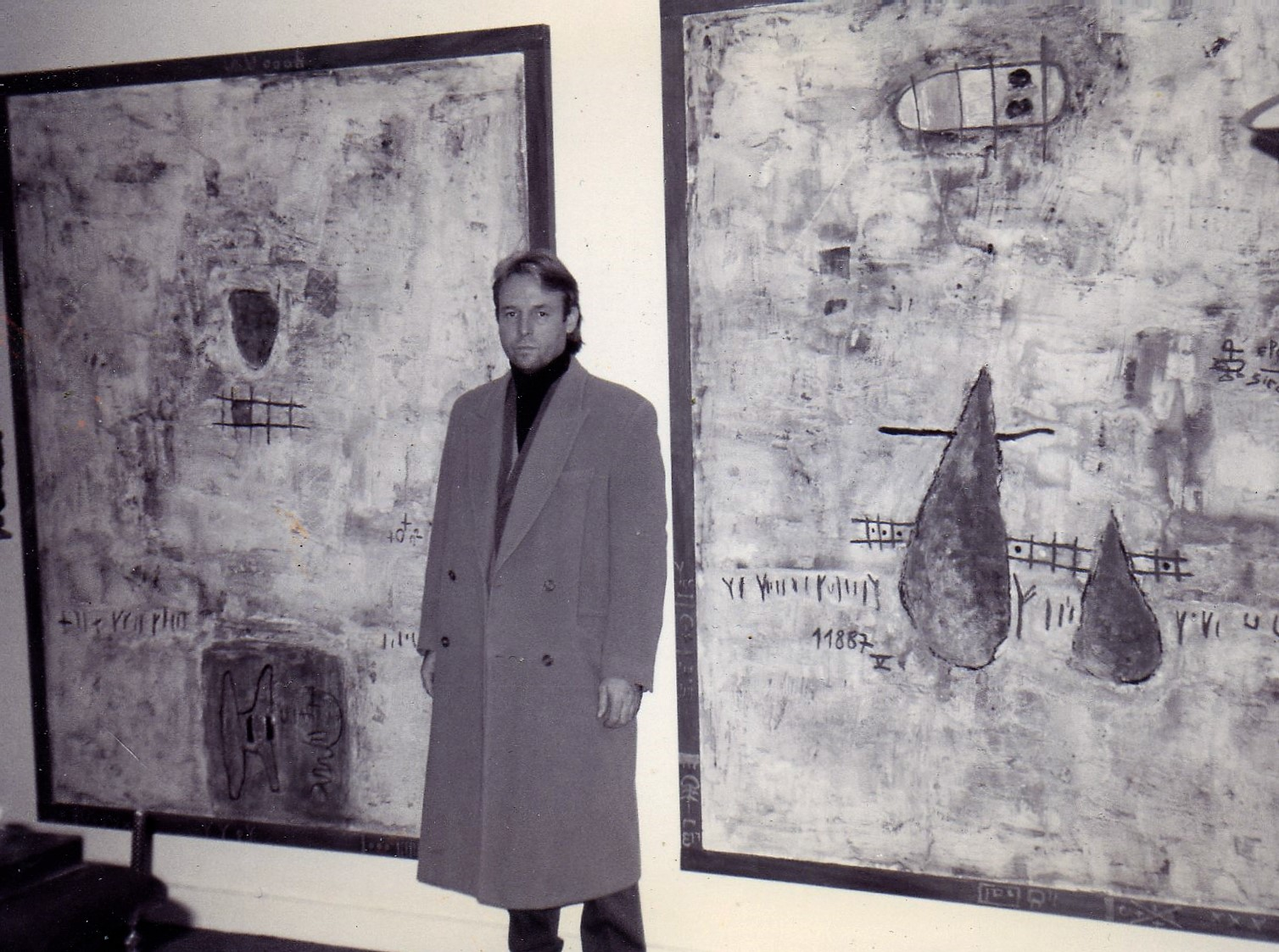 Richard MAROLLE Bornes de civilisation HUMAIN P28 & C76 collection privée Genève 1993 PAINTING